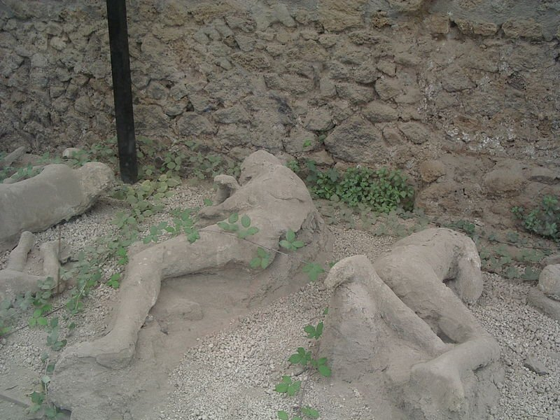 (en) Place: Editing: GIMP (de) Gipsabdrücke von Opfern des Vesuvausbruchs